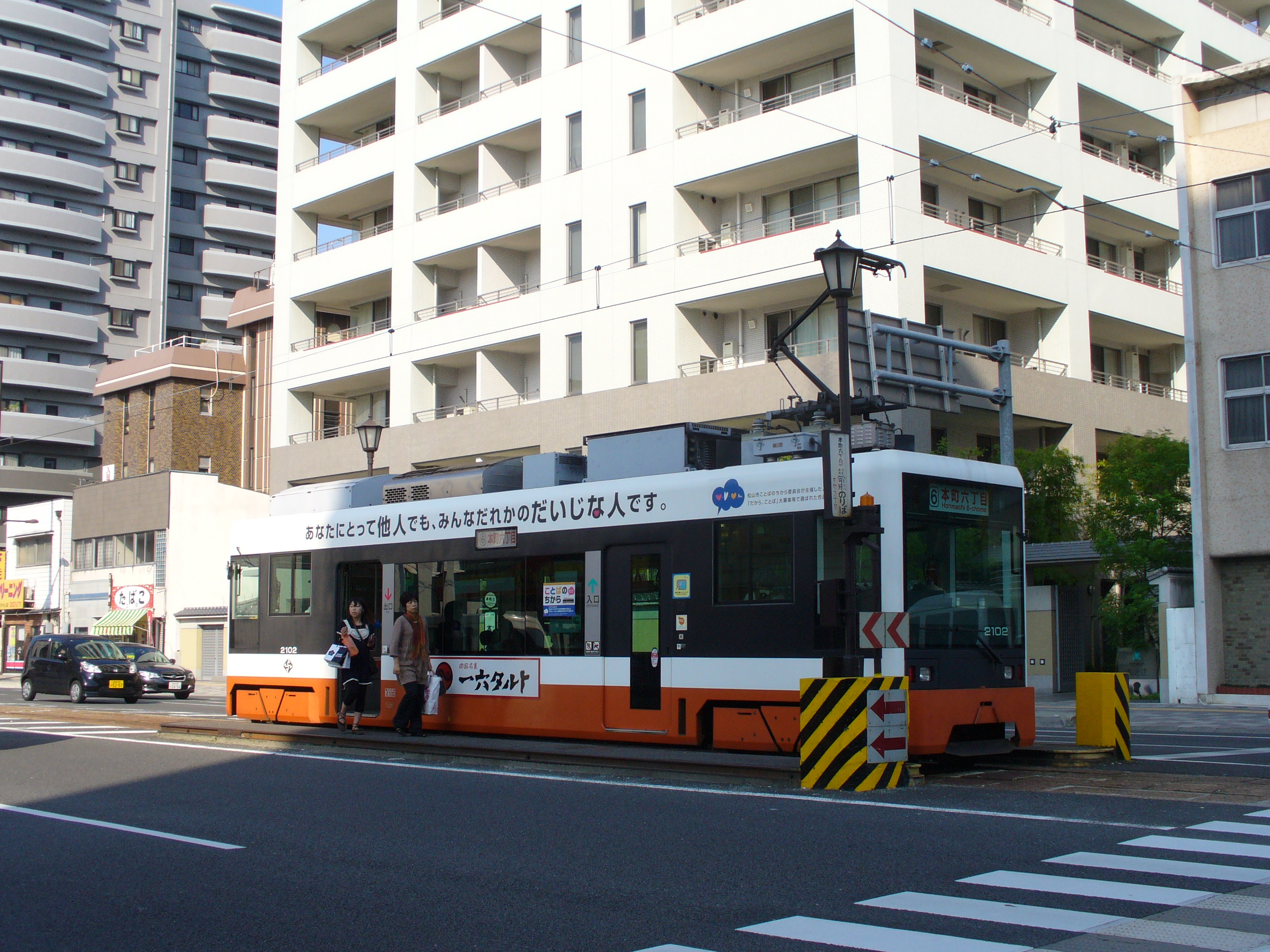 本町3丁目電停